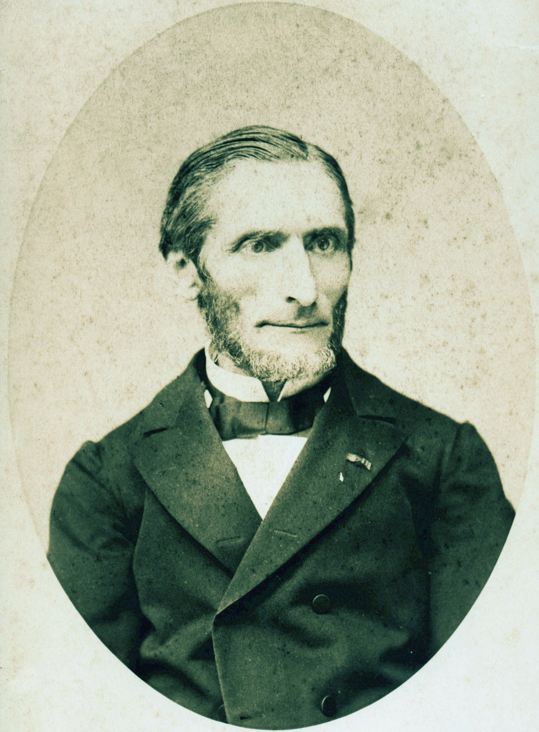 portrait de Félix Pécaut, avant 1870.